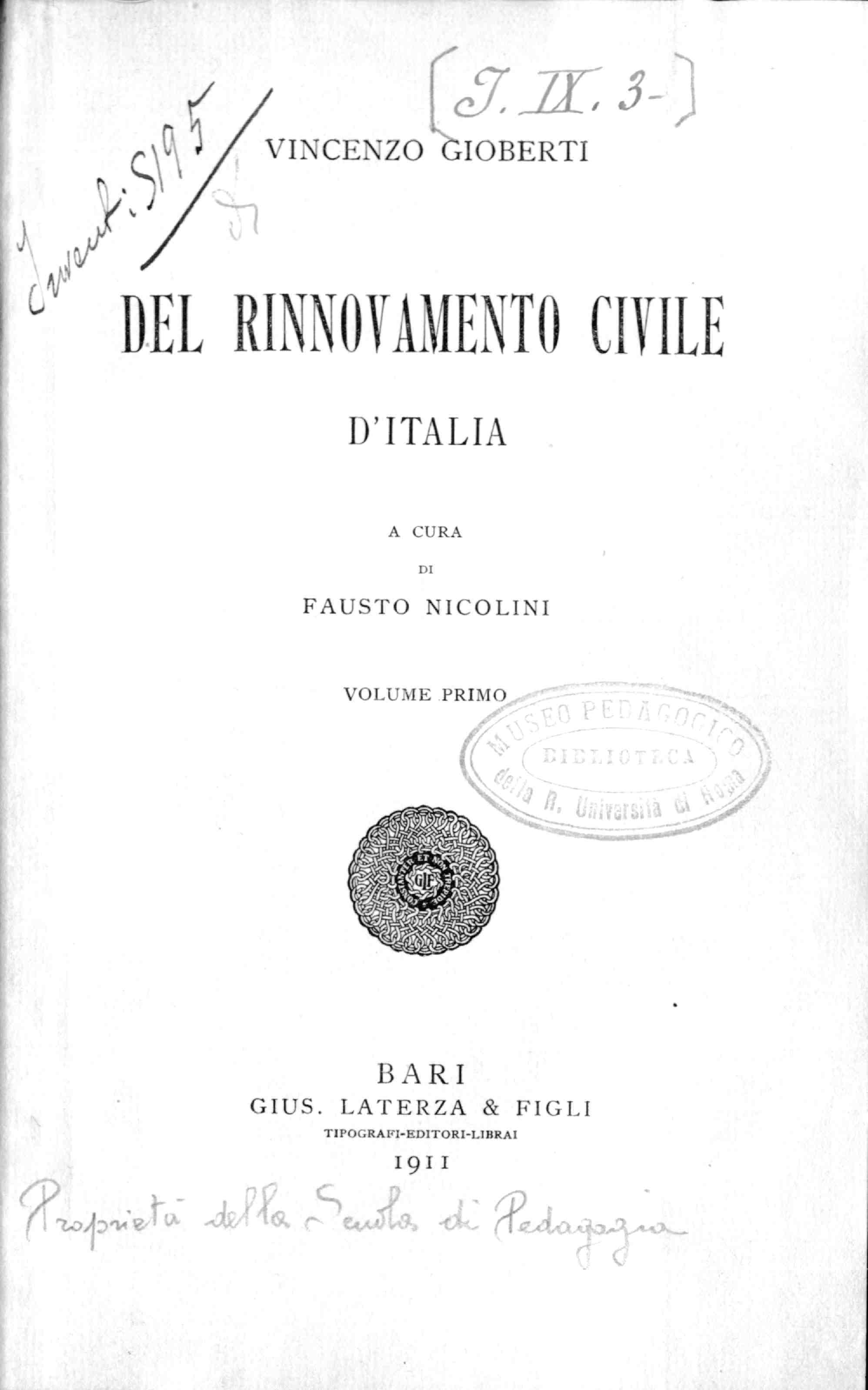 Del rinnovamento civile d'Italia. 1 / Vincenzo Gioberti ; a cura di Fausto Nicolini. - Bari : Laterza, 1911. - 372 p. ; 22 cm. - (Scrittori d'Italia ; 14) .